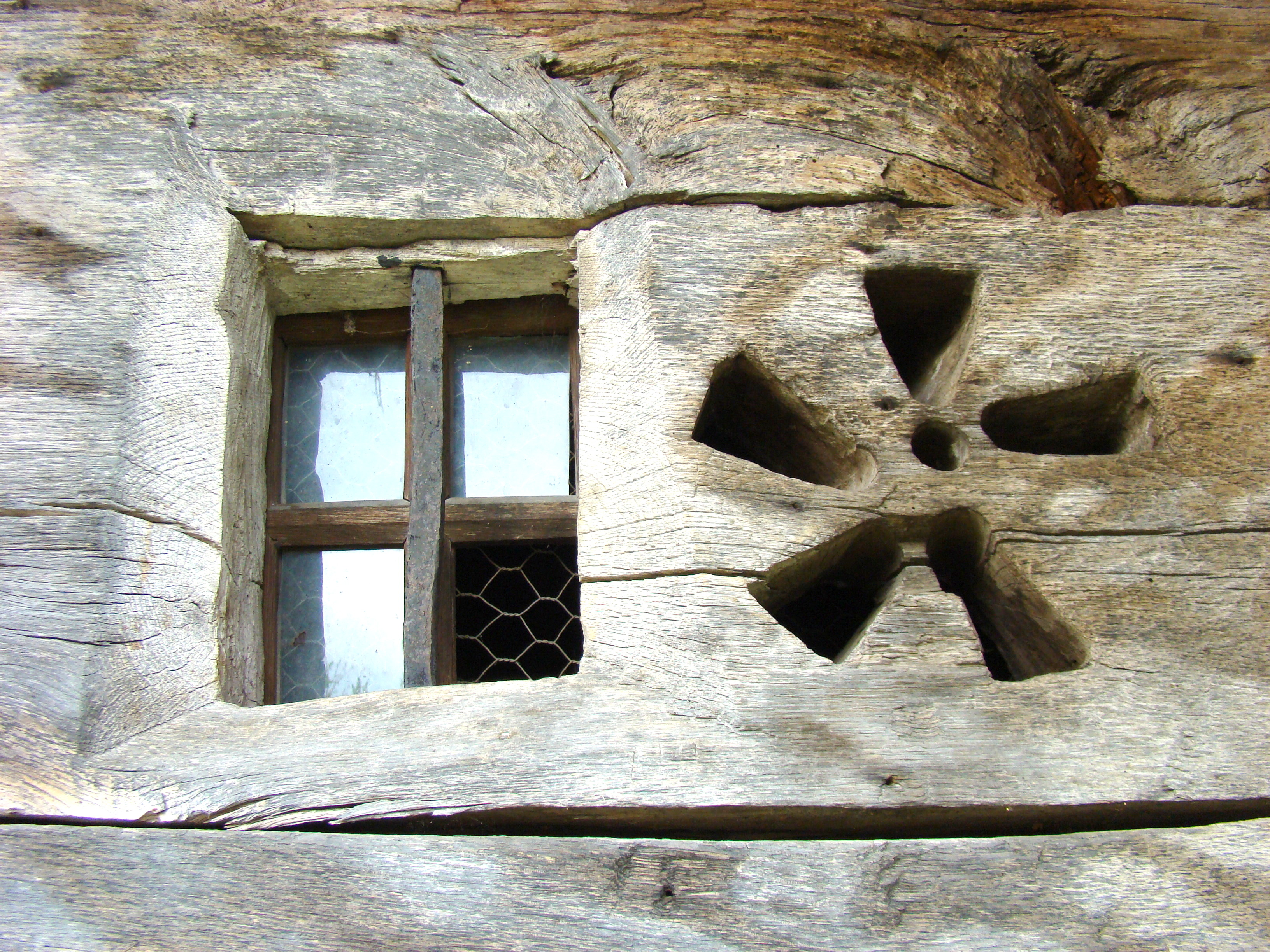 Biserica de lemn „Sfinţii Arhangheli Mihail și Gavriil" din Poarta Sălajului, comuna Românaşi, judeţul Sălaj